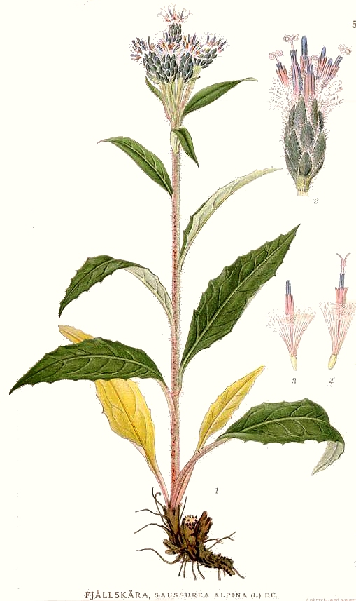 Original Description Fjällskära, Saussurea alpina (L.) DC.